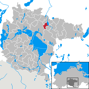 Torgelow am See im Landkreis Müritz, Mecklenburg-Vorpommern